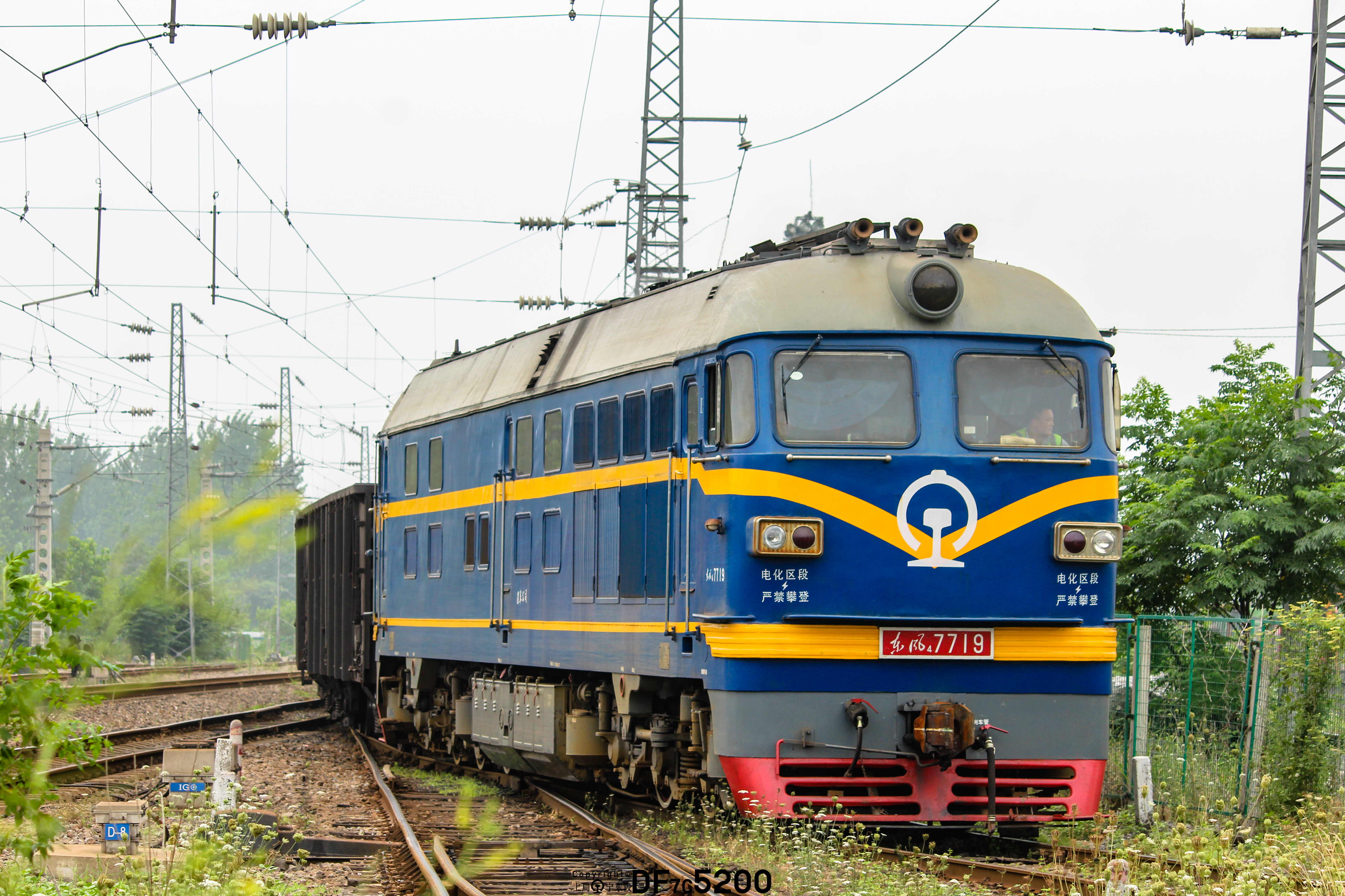 中文（中国大陆）: 漯阜铁路运用的东风4B型内燃机车，于2018年6月30日拍摄于阜阳西站